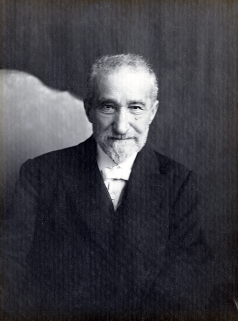 Giovanni Tranquilli, bacologo ascolano.